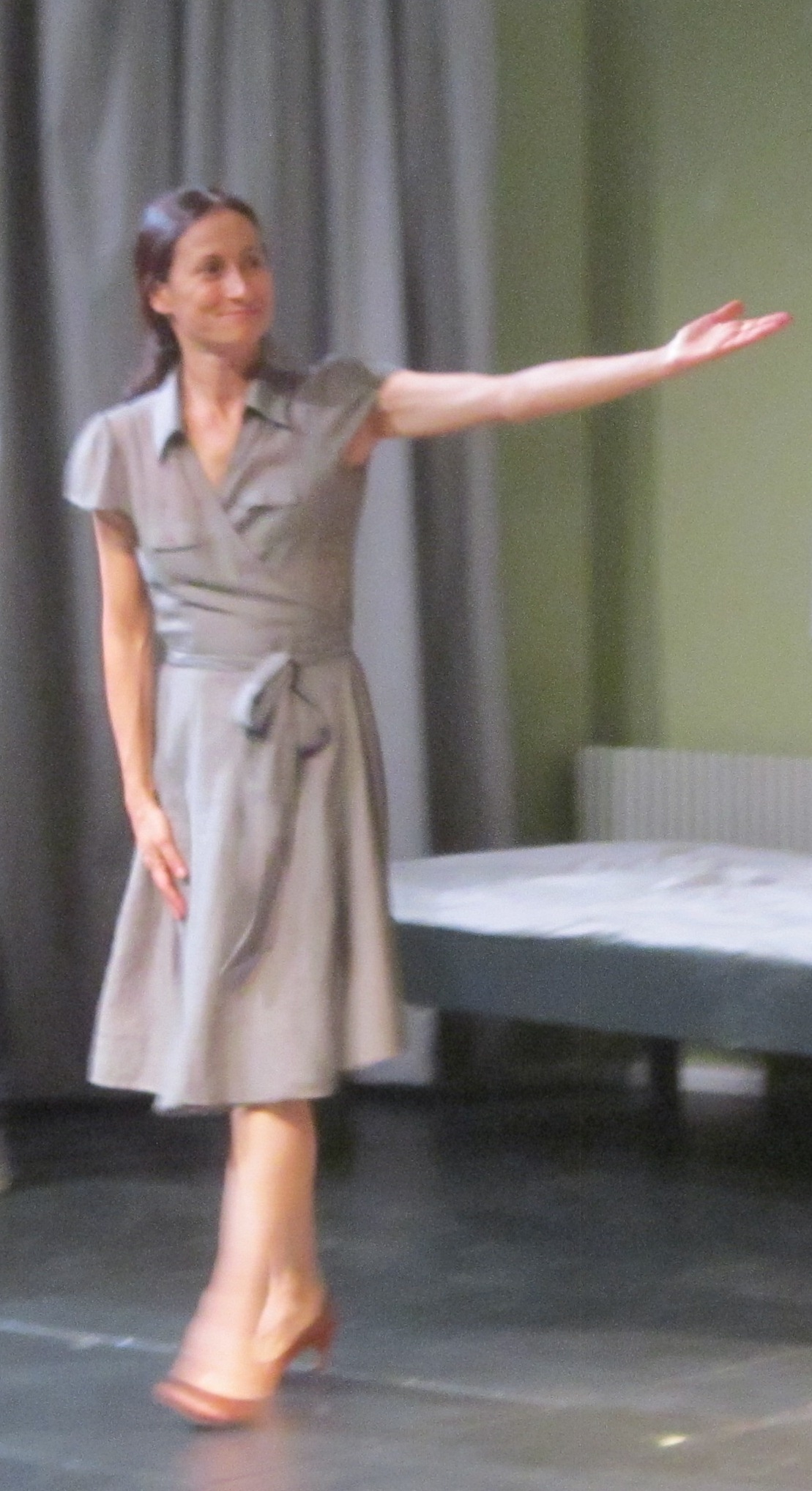 En la obra "El Padre", abril de 2018